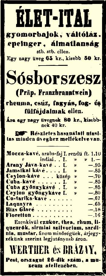 Brázay Kálmán hirdetése